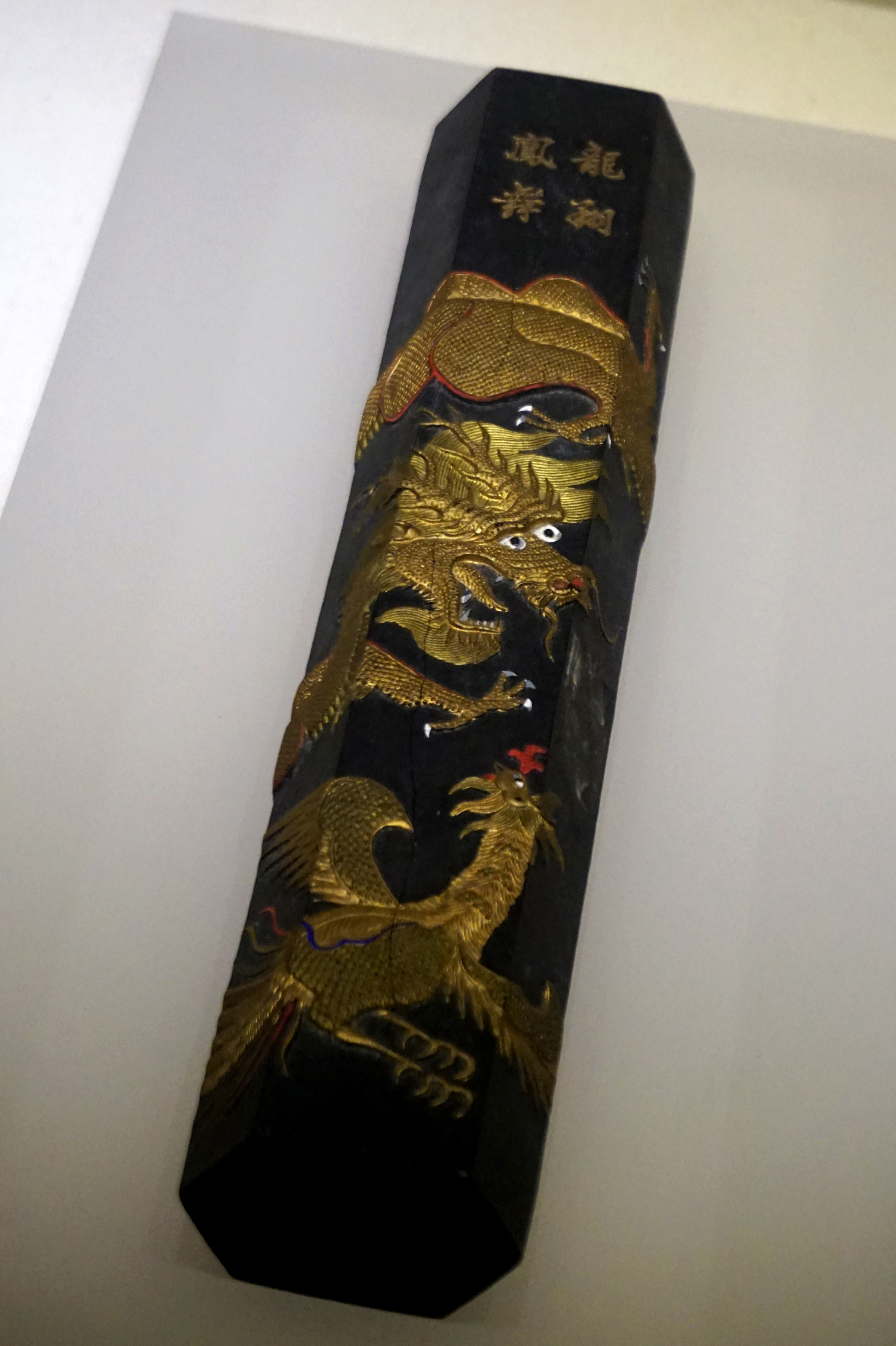 胡开文龙翔凤舞柱形墨。安徽博物院藏。